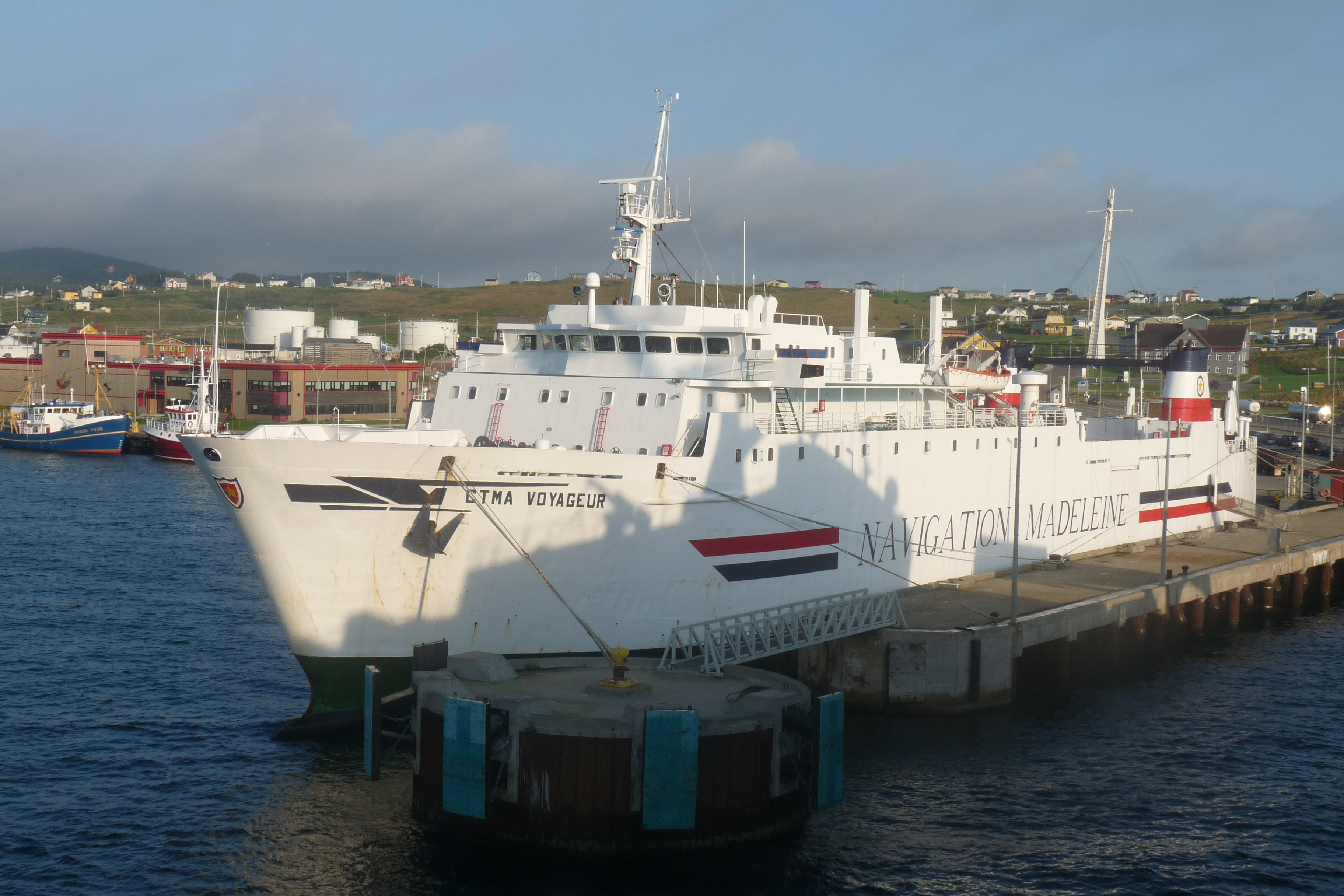 CTMA Voyageur aux quai de Cap-au-Meules